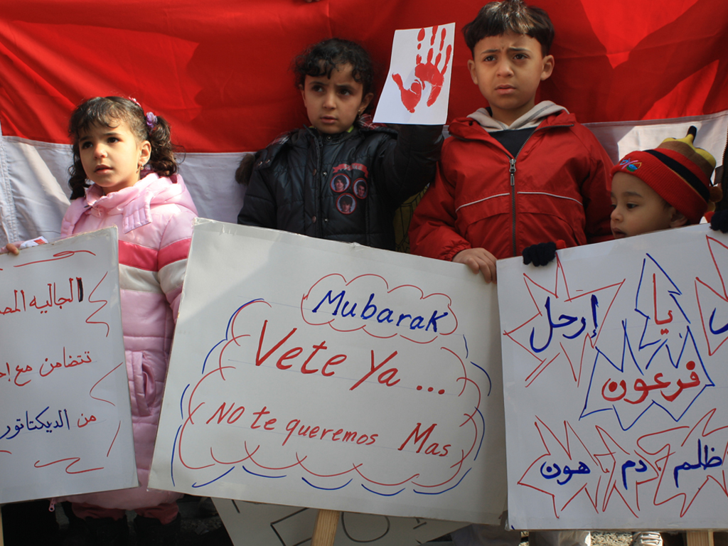 Concentración Embajada Egipto. Madrid